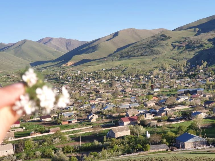 գյուղ Ջրաշեն